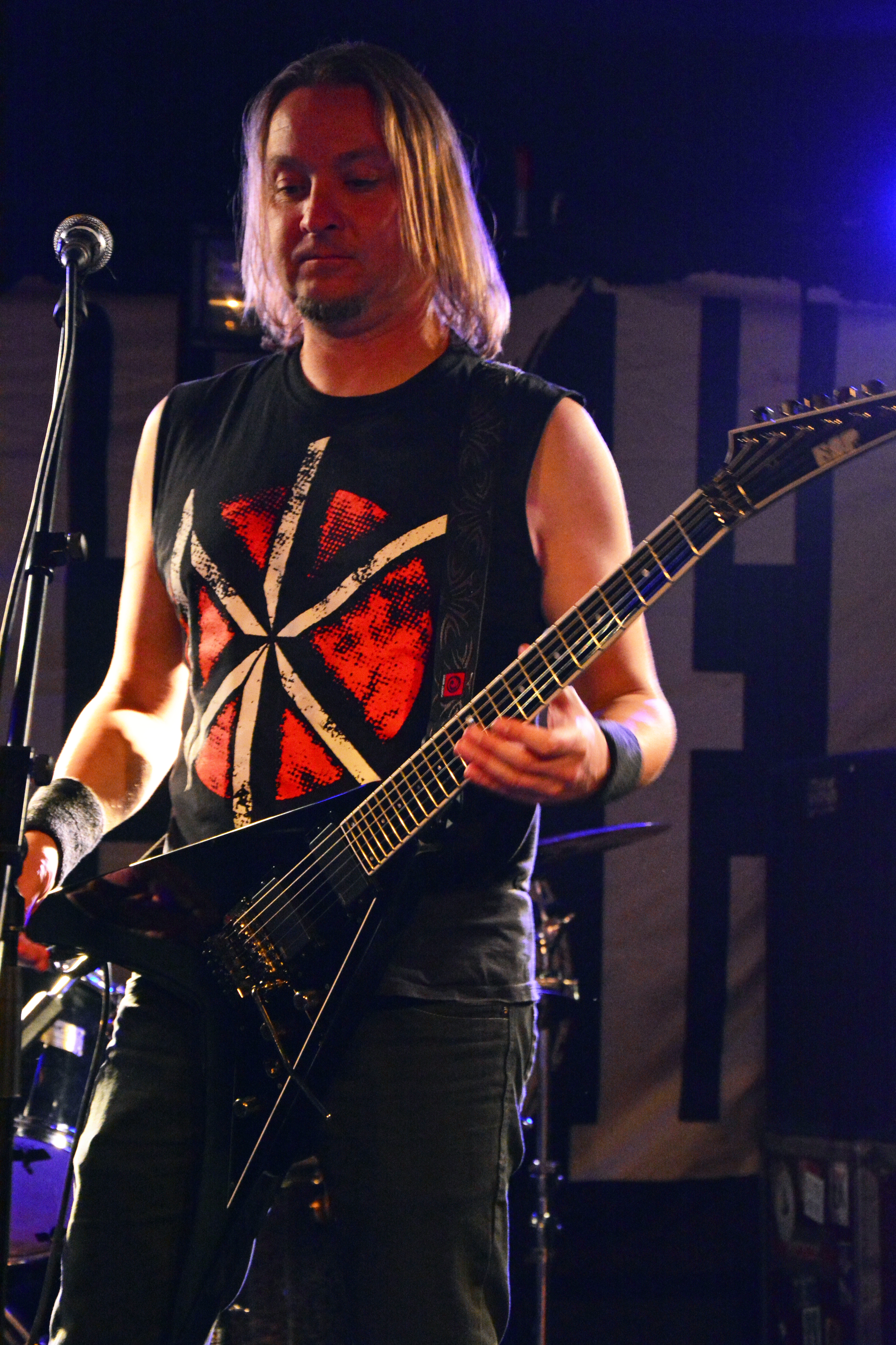 Frank Thoms von Accu§er beim Soundcheck bei den Hamburg Metal Dayz 2013